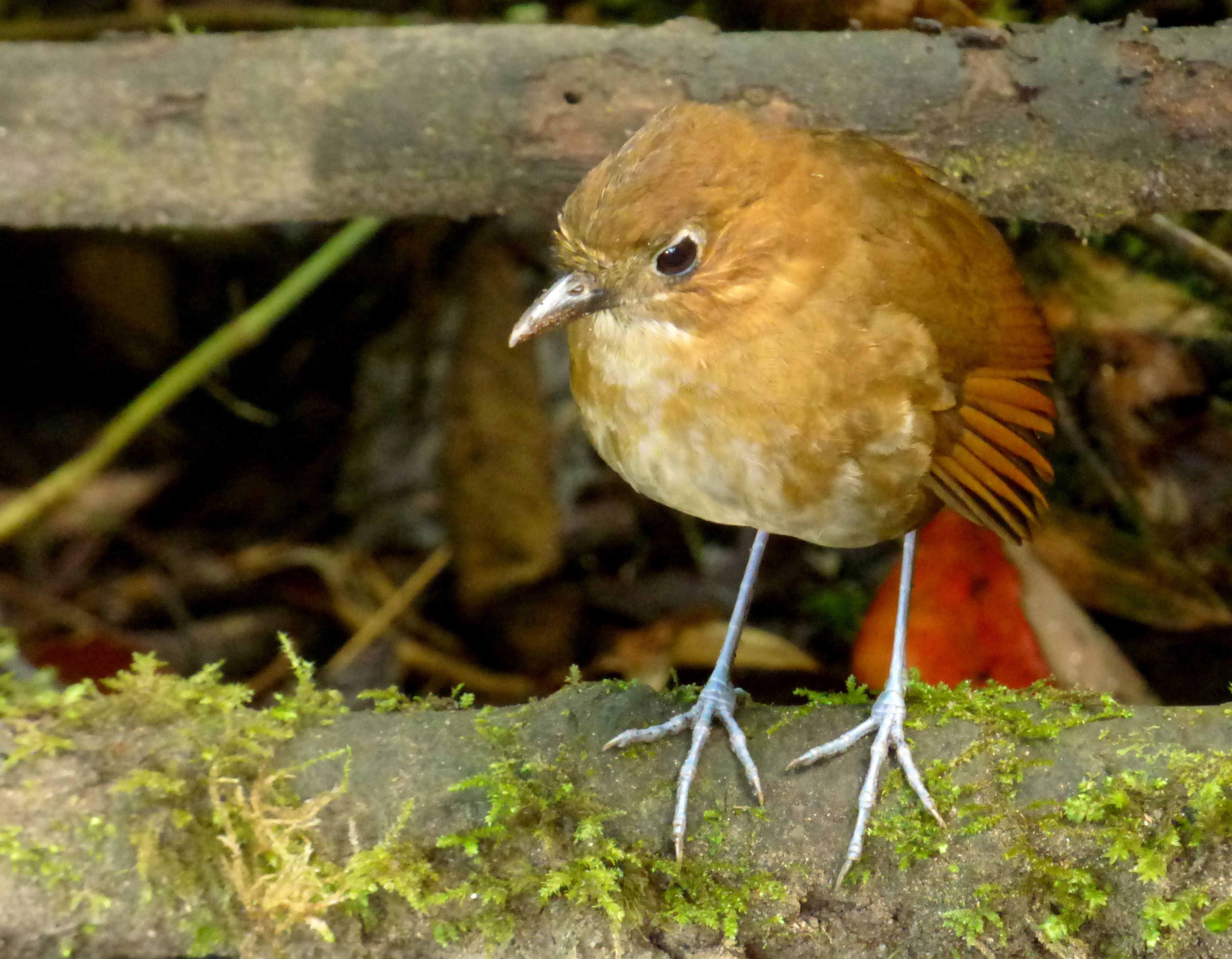 Grallaria millerii (Gralaria de Miller)